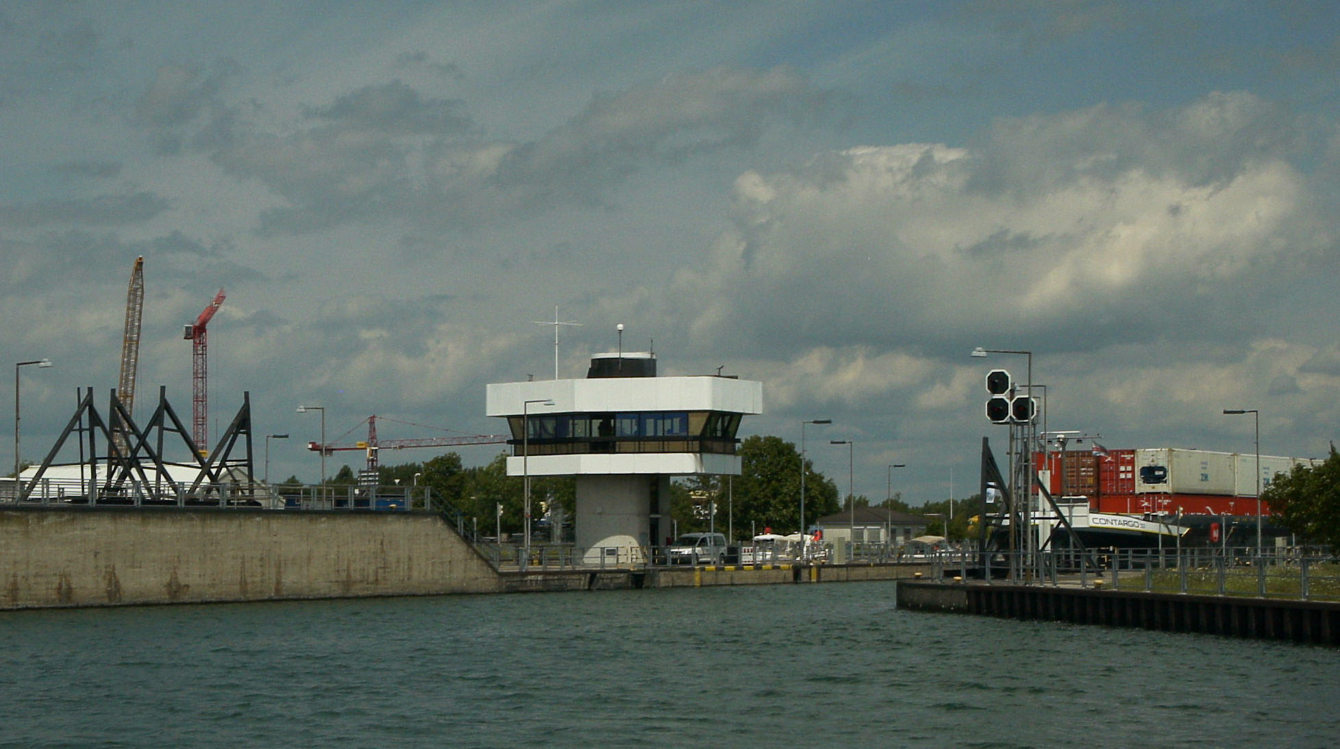 Schleuse Staustufe Iffezheim Oberwasser